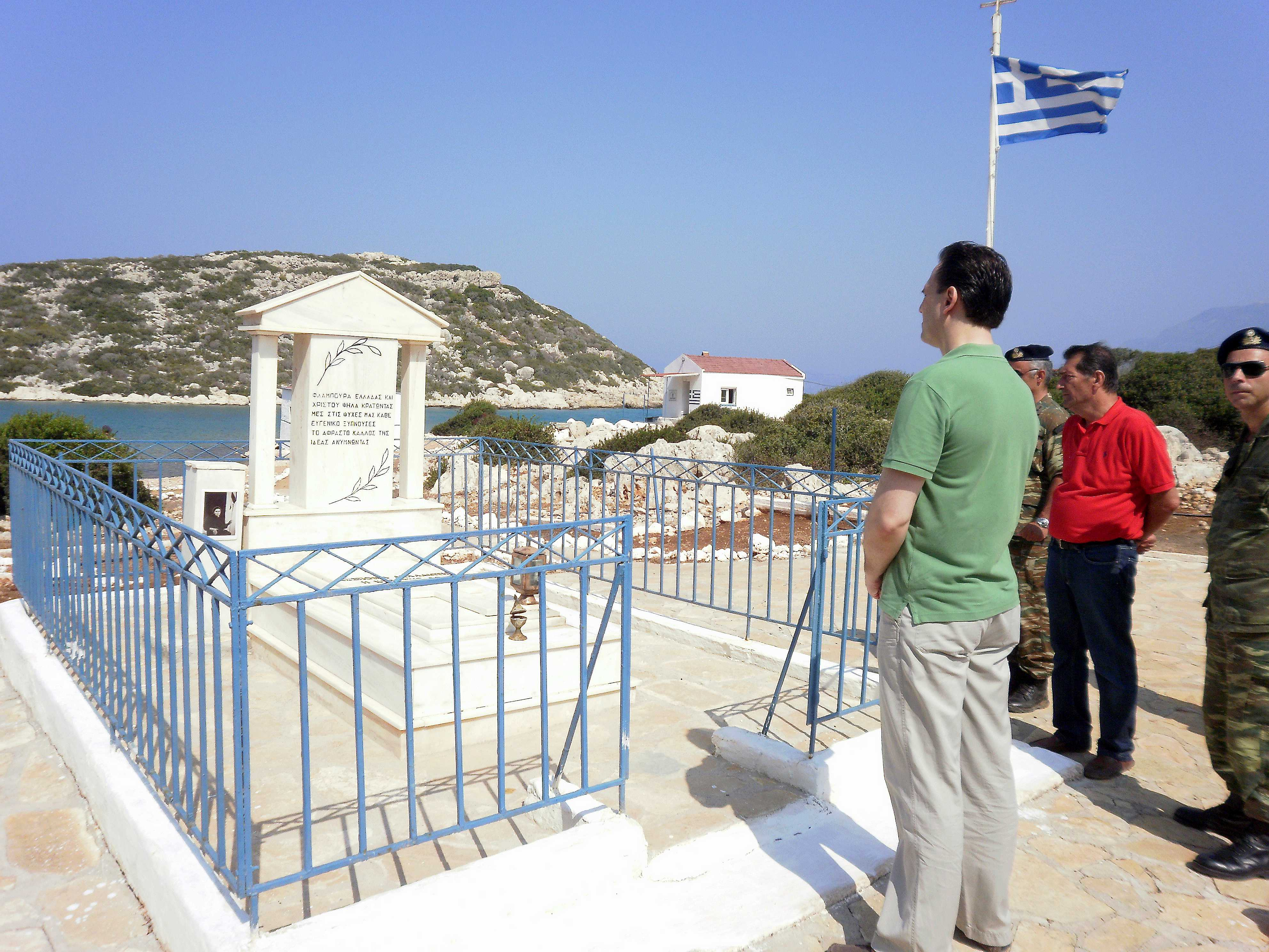 Επίσκεψη ΑΝΥΠΕΞ κ. Δ. Δρούτσα στη Ρω. 9 Αυγούστου 2010. Φωτογραφία: Υπουργείο Εξωτερικών